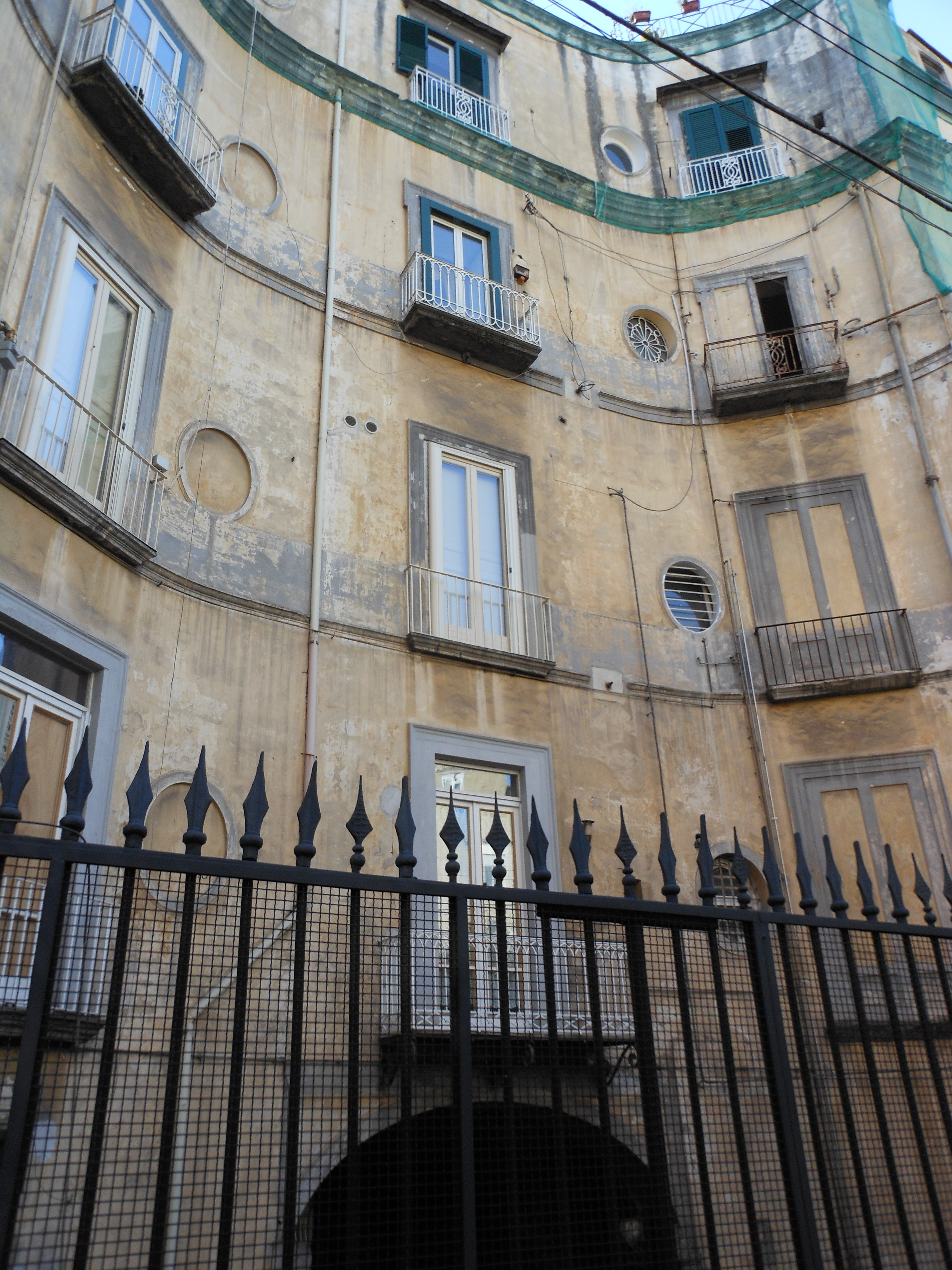 Cortile del palazzo Di Majo, visto da via Santa Teresa